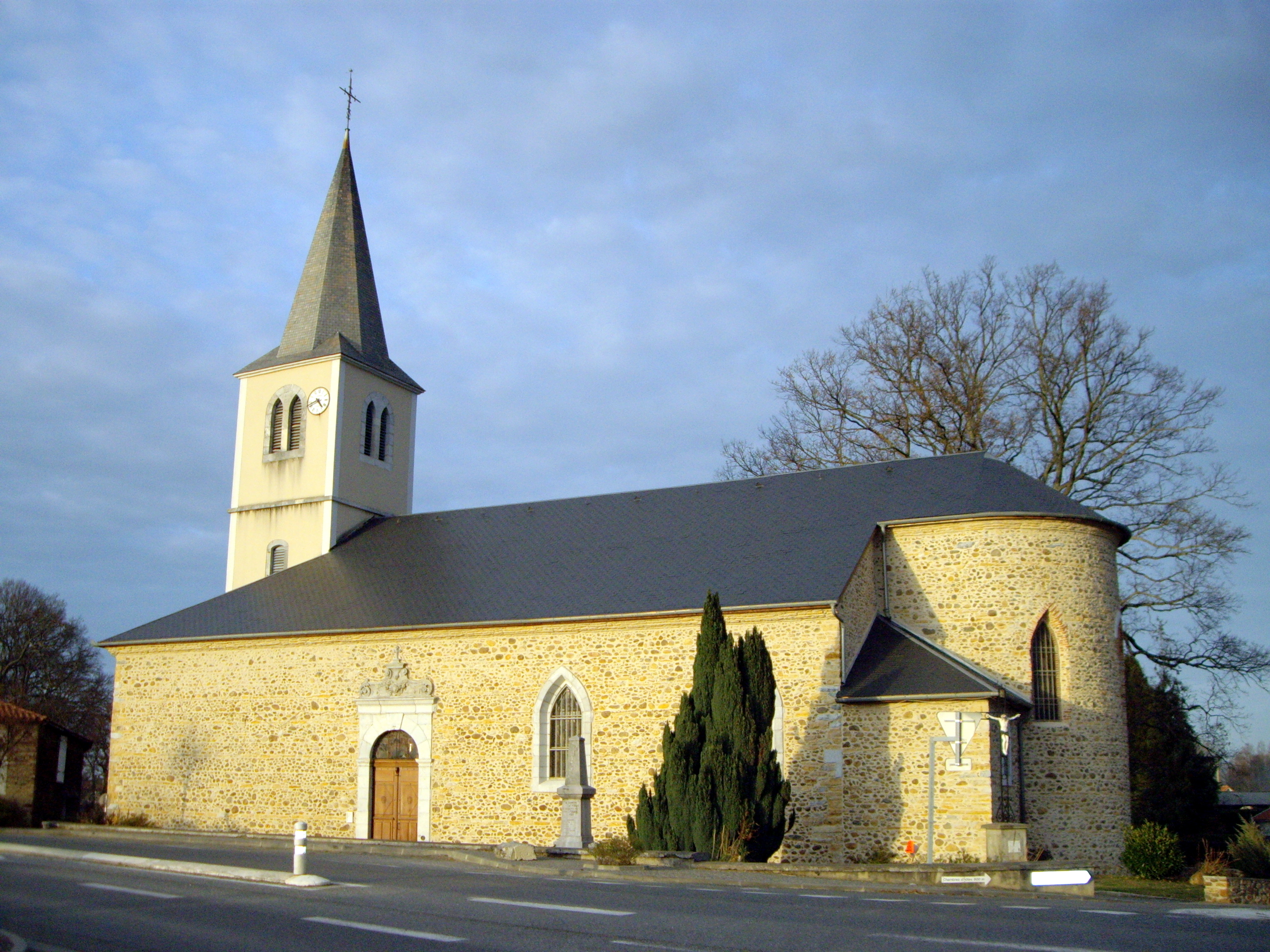 Église de la Nativité-de-la-Sainte-Vierge de Pinas (65)